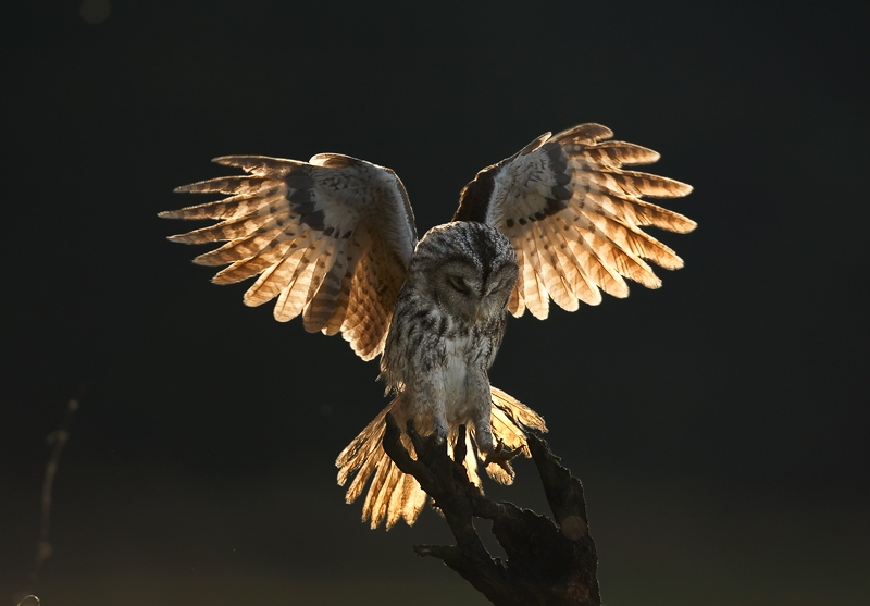 Strix aluco, Žďárské vrchy, CZ